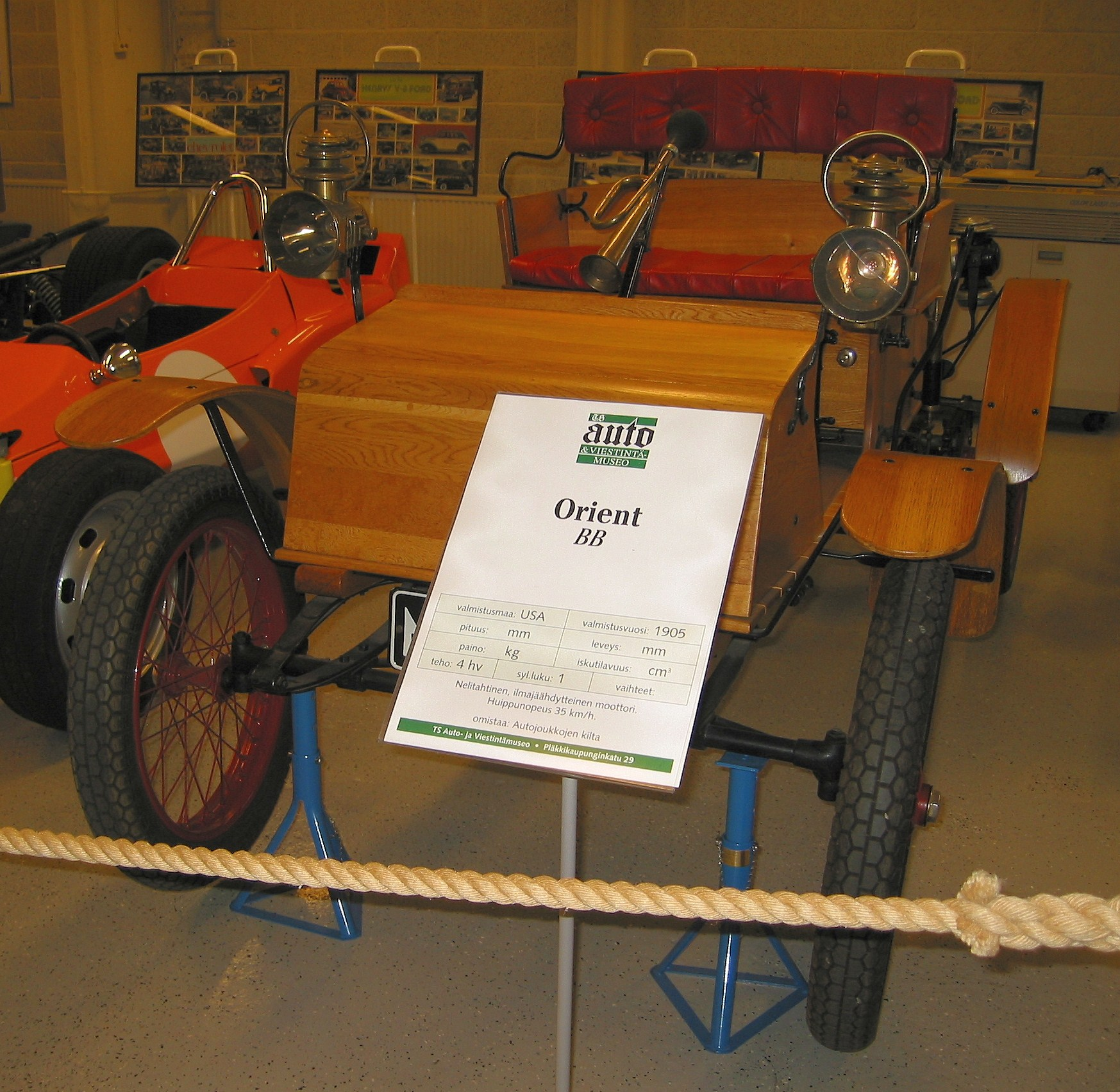 Orient von 1905 im Automobile and Communication Museum (Turku).